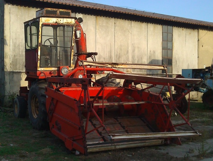 Orkan Z350 i przyrząd Z343